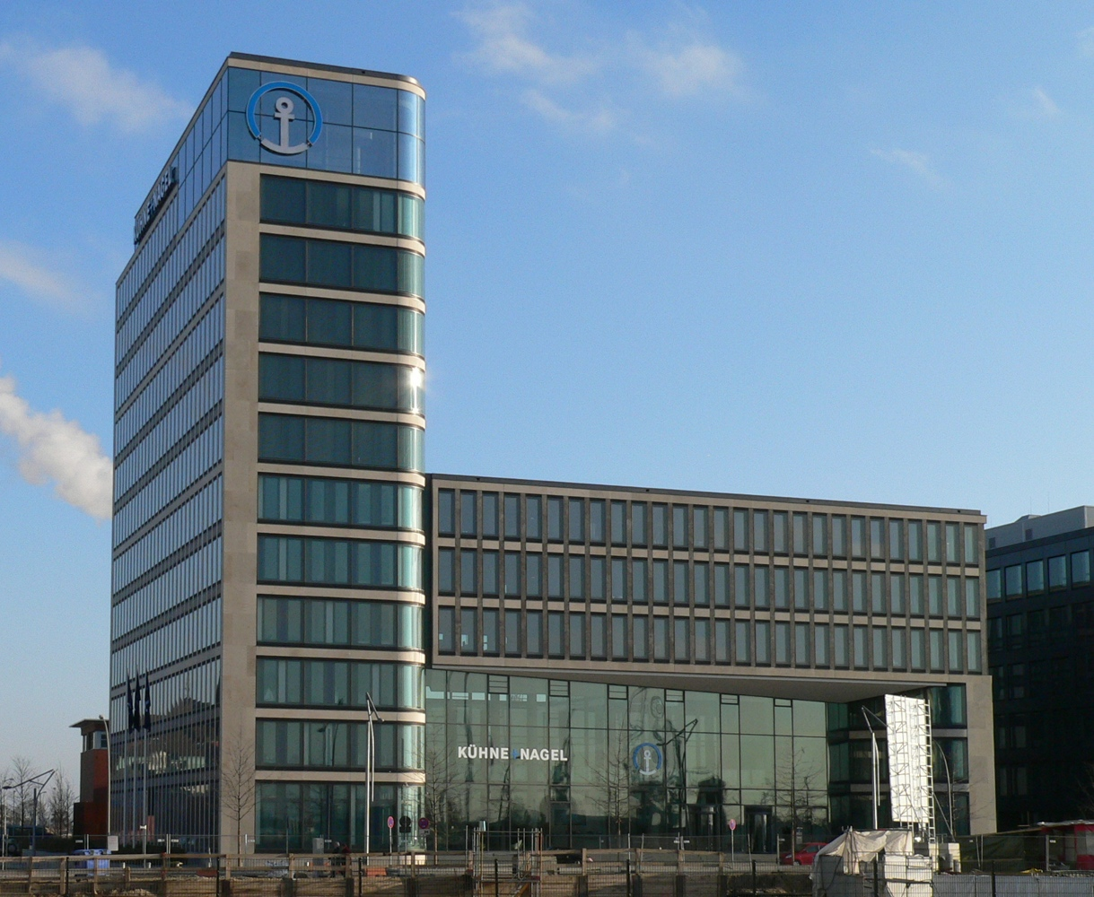 Verwaltungsgebäude Kühne + Nagel, HafenCity; Architekt:Jan Störmer